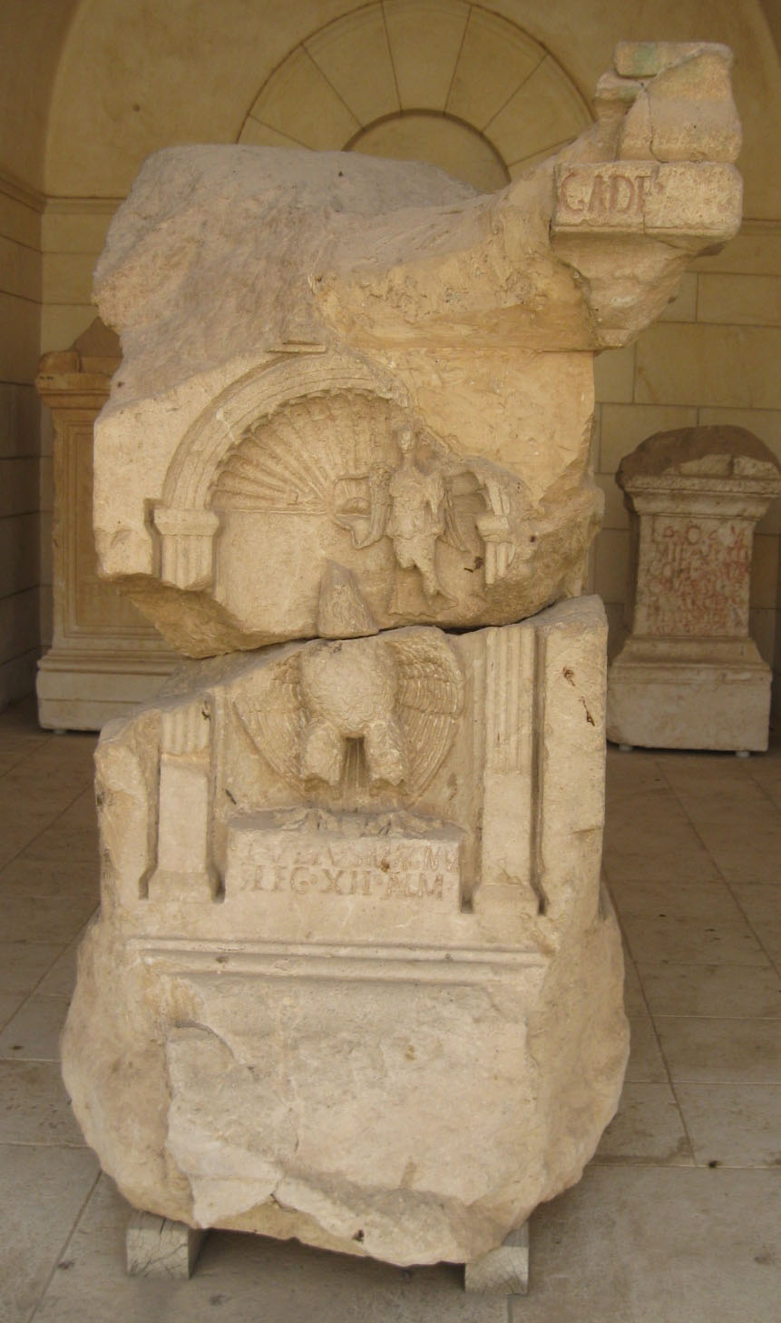 מזבח שהציב יוליוס מאגנוס, מפקד הלגיון השנים עשר פולמינטה. בחזית המזבח מגולף עיט, מוכתר בזר בידי ניקה, אלת הניצחון. בגומחה הימינית ניצבת פורטונה, אלת המזל, ובגומחה השמאלית מינרווה, אלת המלחמה. בגומחה האחורית ניקה עם שלל ניצחון ביד אחת וכף תמר ביד השנייה. החלק התחתון של המזבח התגלה בחולות קיסריה ב-1947 ופורסם על ידי ברוך ליפשיץ. החלק העליון נחשף ב-1983. נוסח הכתובת: יוליוס מגנוס, (קנטוריון) של הלגיון השנים עשר פולמינטה [Iovi Optimo Maximo Turma]sgade // Iulius Magnu(s) / (centurio) leg(ionis) XII Fulm(inatae) פרסום הכתובת: ב. ליפשיץ, לגיונות רומיים בארץ־ישראל, ידיעות החברה לחקירת ארץ ישראל ועתיקותיה כ"ג, תשי"ט, עמ' 64 (=מרד בר כוכבא, אהרון אופנהיימר (עורך), 1980, עמ' 95-110) B. Lifshitz, Inscriptions latines de Césarée en Palestine, Latomus 21, 1962, pp. 149-150. No. 1; Pl. 4,2; Pl. 4,1 B. Lifshitz, Césarée de Palestine, ANRW II. 8, (Berlin - New York 1977), p. 502 L.Y. Rahmani,Un autel funéraire romain à Césarée maritime RB 85, 1978, pp. 268-276; Pl. 17-20; fig. 1, 2 L.Y. Rahmani,L'autel de Césarée. Note additionnelle RB 88, 1981, pp. 240-244; pl. 7; fig. 1 E. Puech, Note d'epigraphie latine palestinienne; le dieu Turmasgada a Cesaree Maritime, RB 89, 1982, pp. 210-221. C.M. Lehmann, and K. G. Holum, The Greek and Latin Inscriptions of Caesarea Maritima, Boston 2000, No. 119 Eck, W., Ein Altar aus Caesarea Maritima und ein neues Dokument für den nordsyrischen Gott Turmasgade, ZPE 174, 2010, pp. 185-188